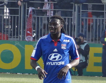 Match de football (Ligue 1) entre le Stade brestois 29 et l'Olympique lyonnais, le 3 mars 2013